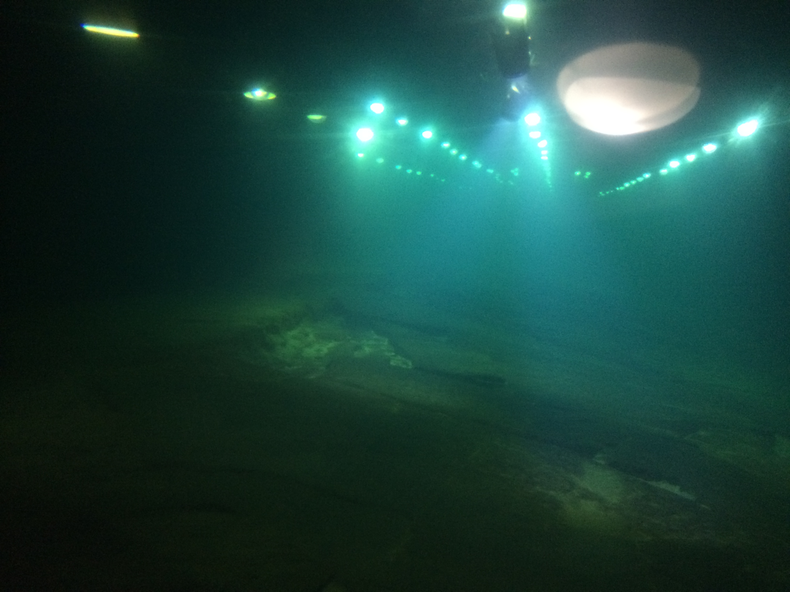 位于重庆涪陵段长江底下的白鹤梁石刻。